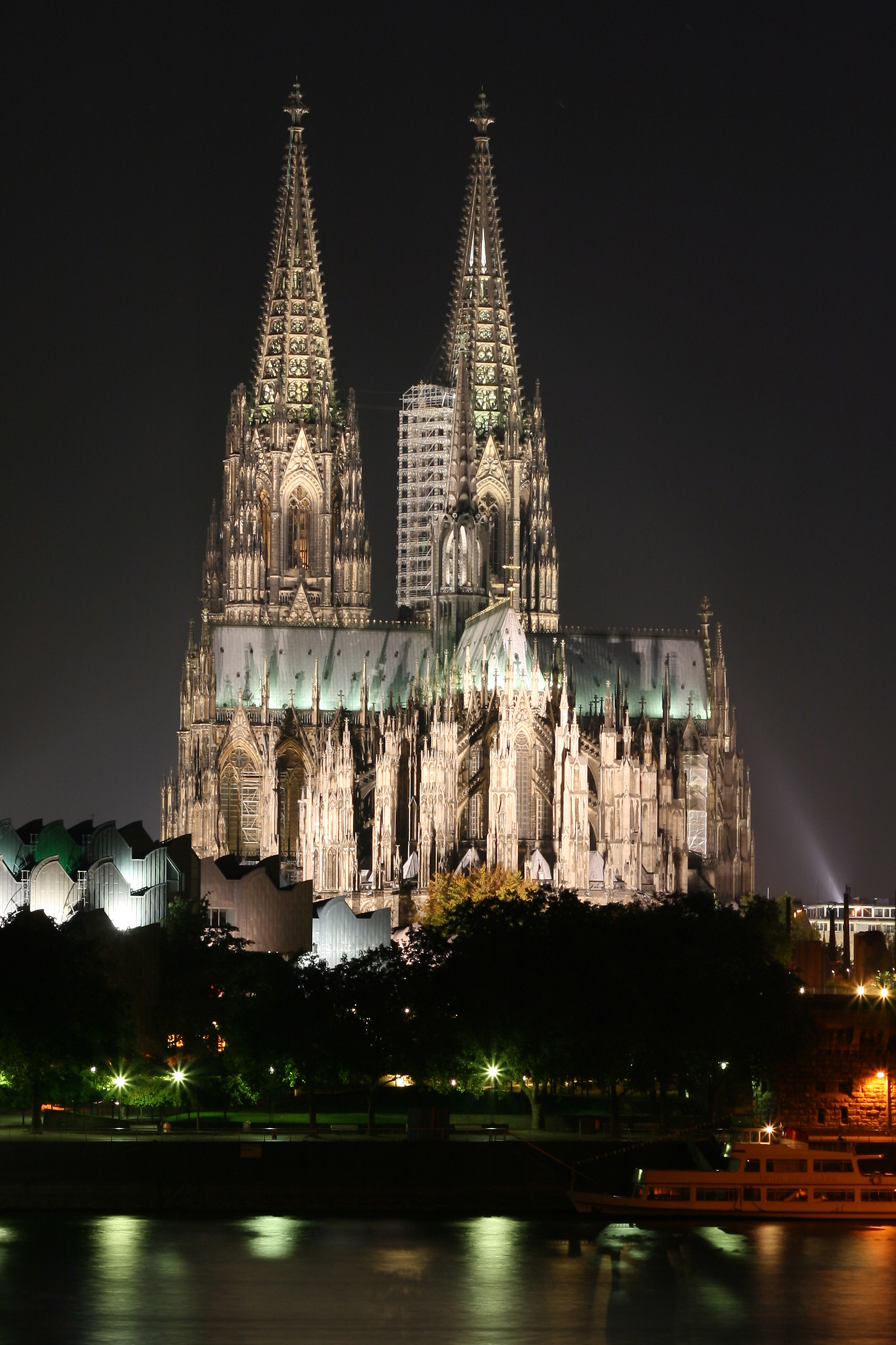 der Kölner Dom bei Nacht, mit dem Rhein im Vordergrund